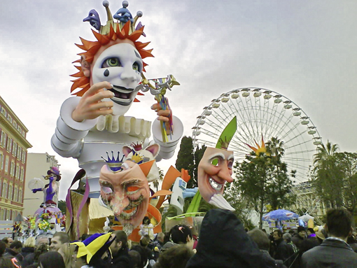 Le carnaval de Nice en mars 2009.